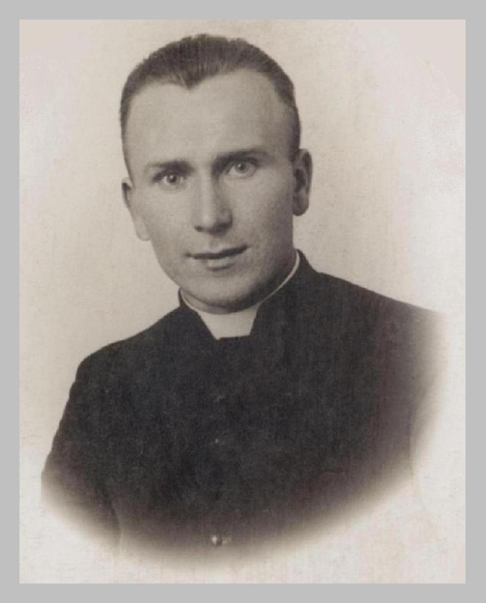 Ksiądz Jan Macha